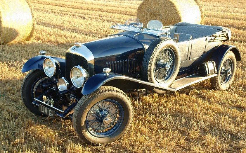 Der Bentley 4.5-litre von König Edward VIII. 1929 Bentley 4½ litre now with 1984 Tourer body by H&H Vanden Plas Original body style originally saloon (Weymann) by Gurney Nutting Chassis no. HB3424 Engine no. HB3420 Registration no. UV 6 First owner (Gurney Nutting saloon): HRH Prince of Wales TechnikMuseum Speyer